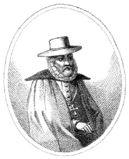 John Grant in wiki